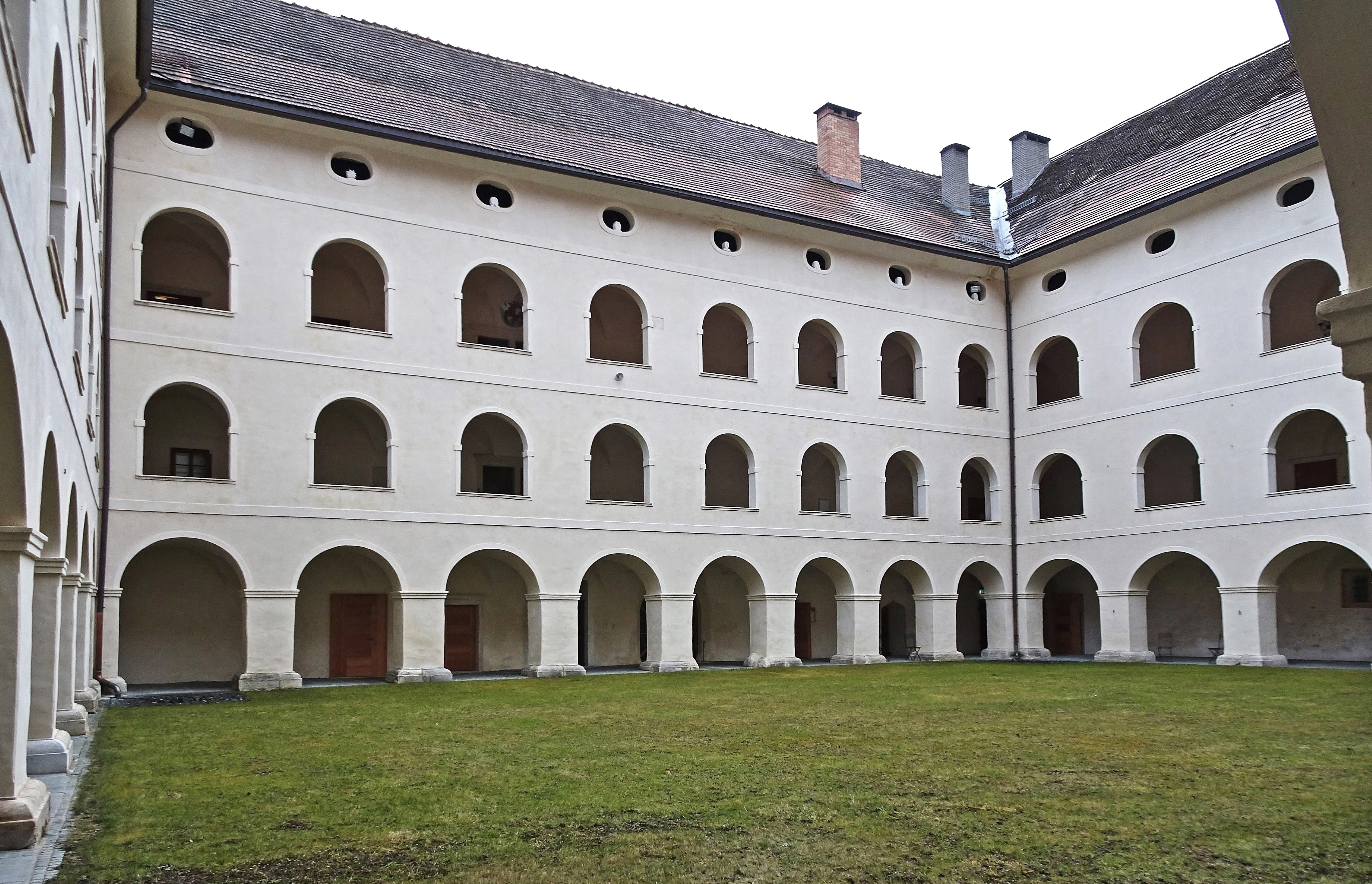 Nordseite der Innenhofarkaden des Probsthofes des Domstiftes Gurk